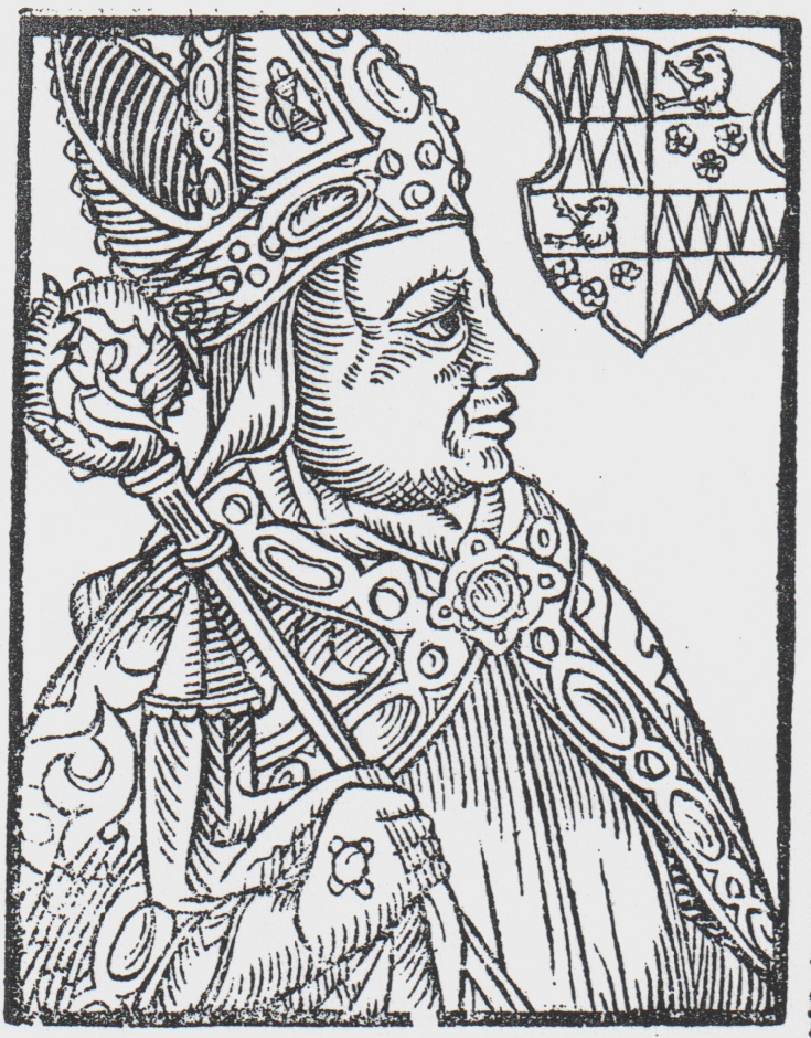 Olomoucký biskup Stanislav Thurzo. Dřevoryt Jana Willenbergra ze "Zrcadla slavného markrabství moravského" Bartoloměje Paprockého.